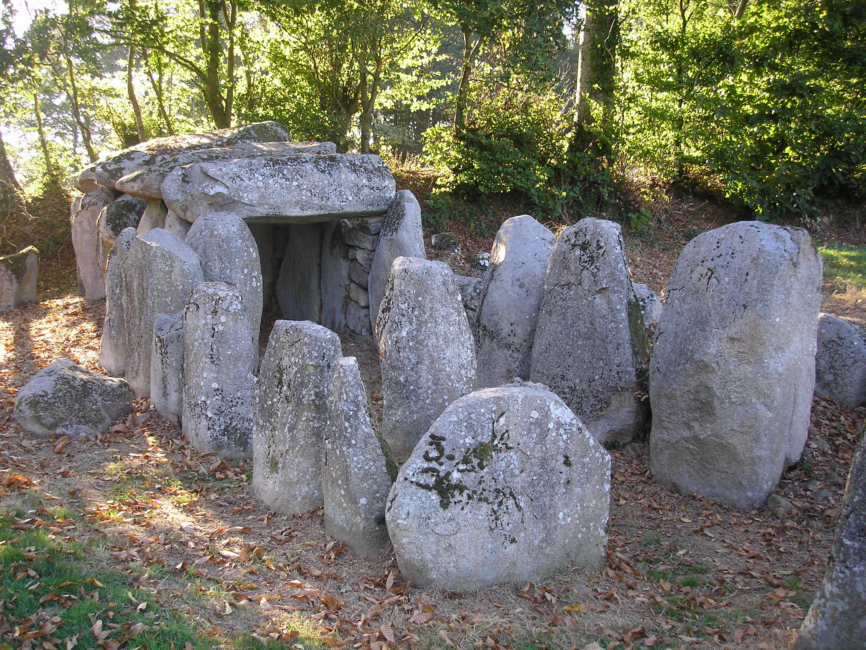 Passais (Normandie, France). Dolmen de la Table au Diable.